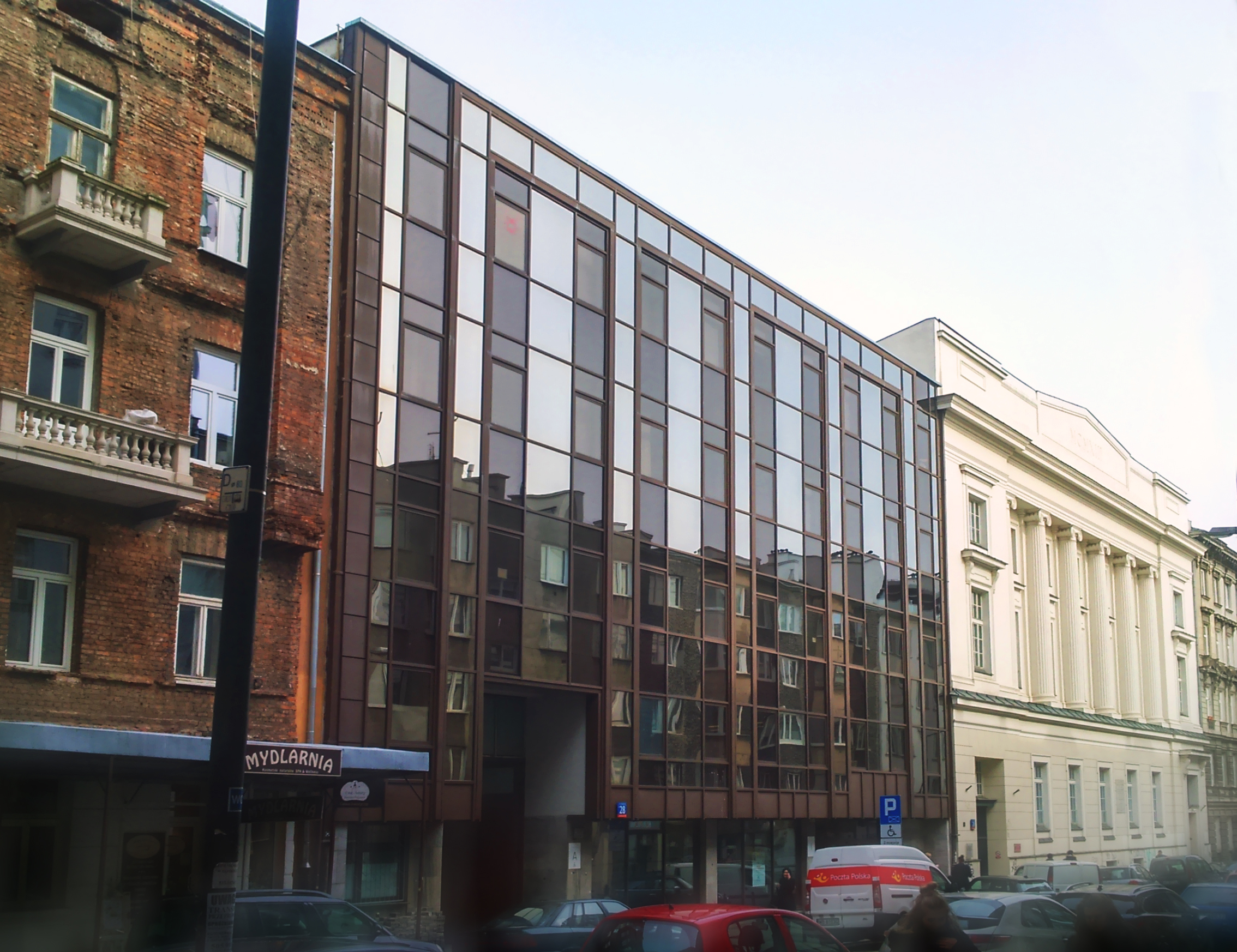 Budynek Biblioteki Publicznej przy ul. Koszykowej w Warszawie